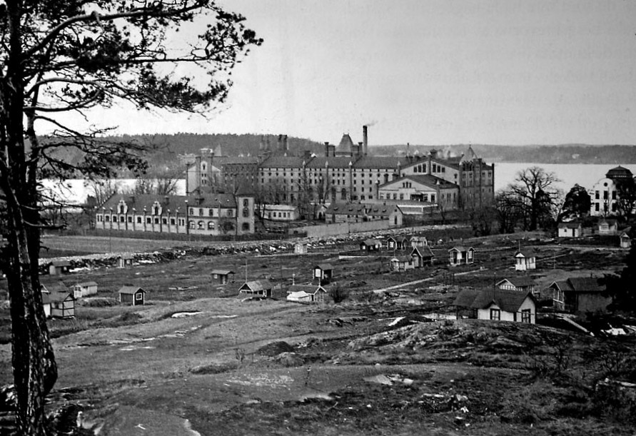 Stora bryggeriet såsom det såg ut för ungefär hundra år sedan, här fotograferat av Axel Malmström. I förgrunden ses en del av koloniområdena som fått ge namn åt de nya bostadskvarteren. Ulvsundasjön i bakgrunden.